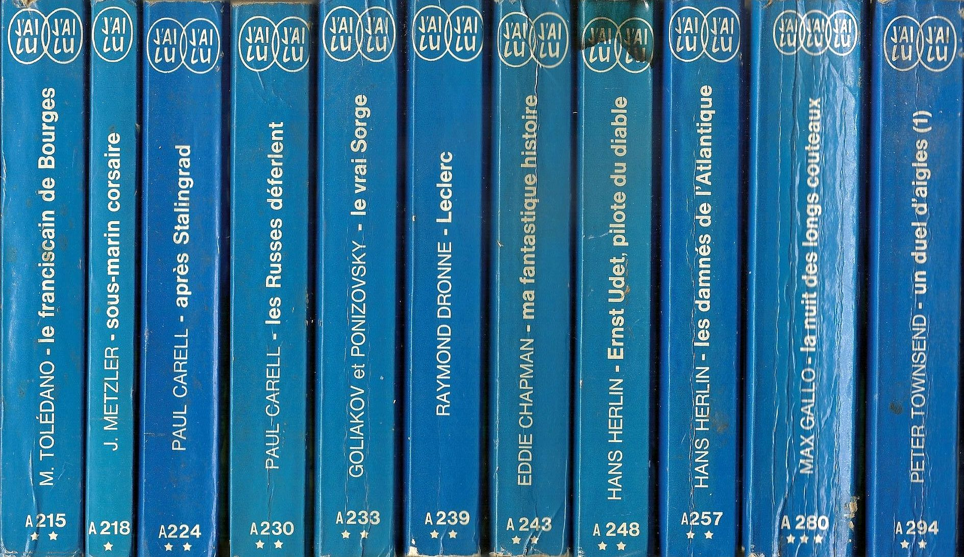 Collection poche 'Leur Aventure' (partie).